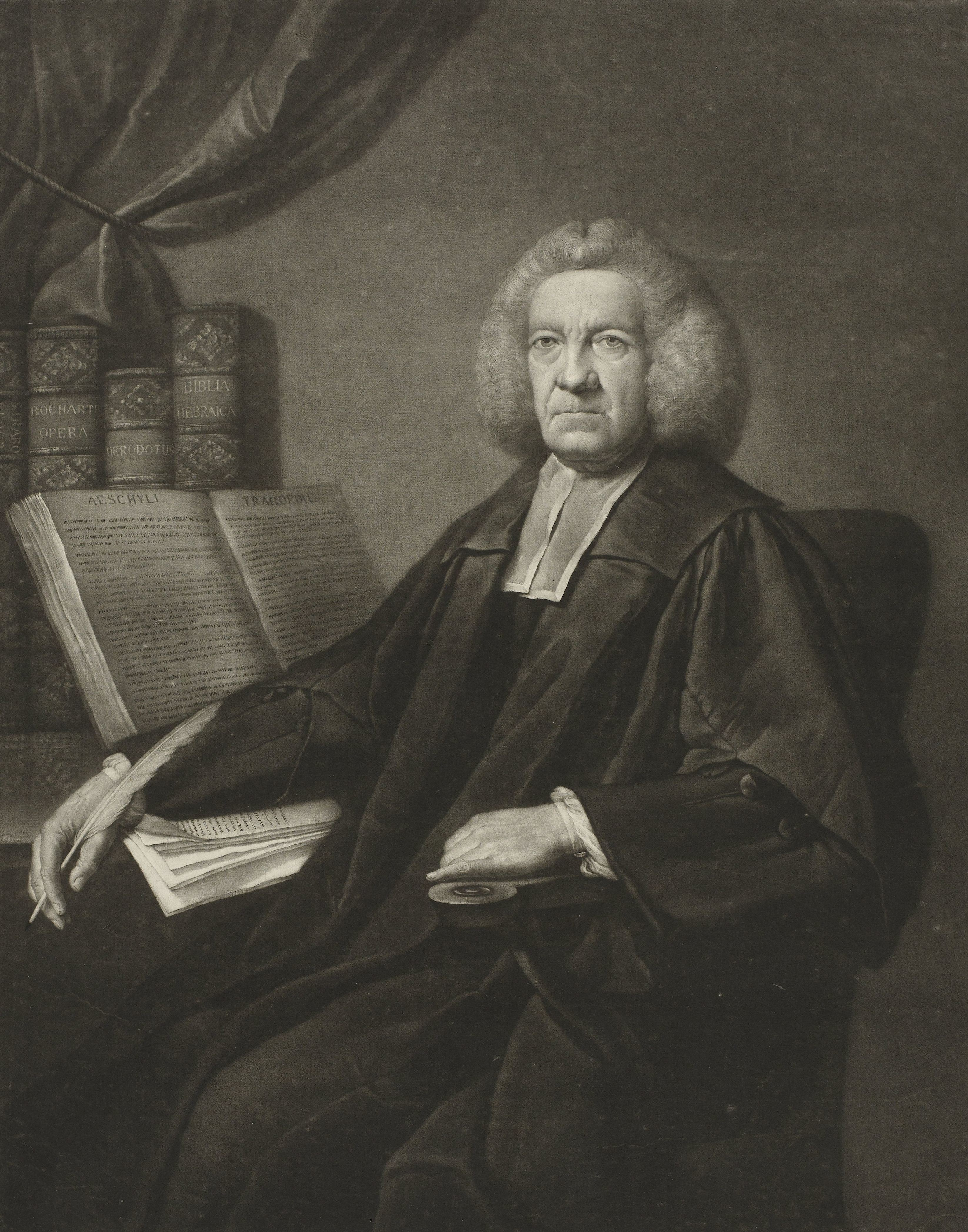 IdentificatieTitel(s): Portret van Samuel ChandlerObjecttype: prent Objectnummer: RP-P-OB-33.709VervaardigingVervaardiger: prentmaker: William Pethernaar schilderij van: Mason Chamberlinuitgever: J. BoydellDatering: 1741 - 1800Fysieke kenmerken: mezzotintMateriaal: papier Techniek: mezzotintVerwerving en rechtenVerwerving: overdracht van beheer 1816Copyright: Publiek domein